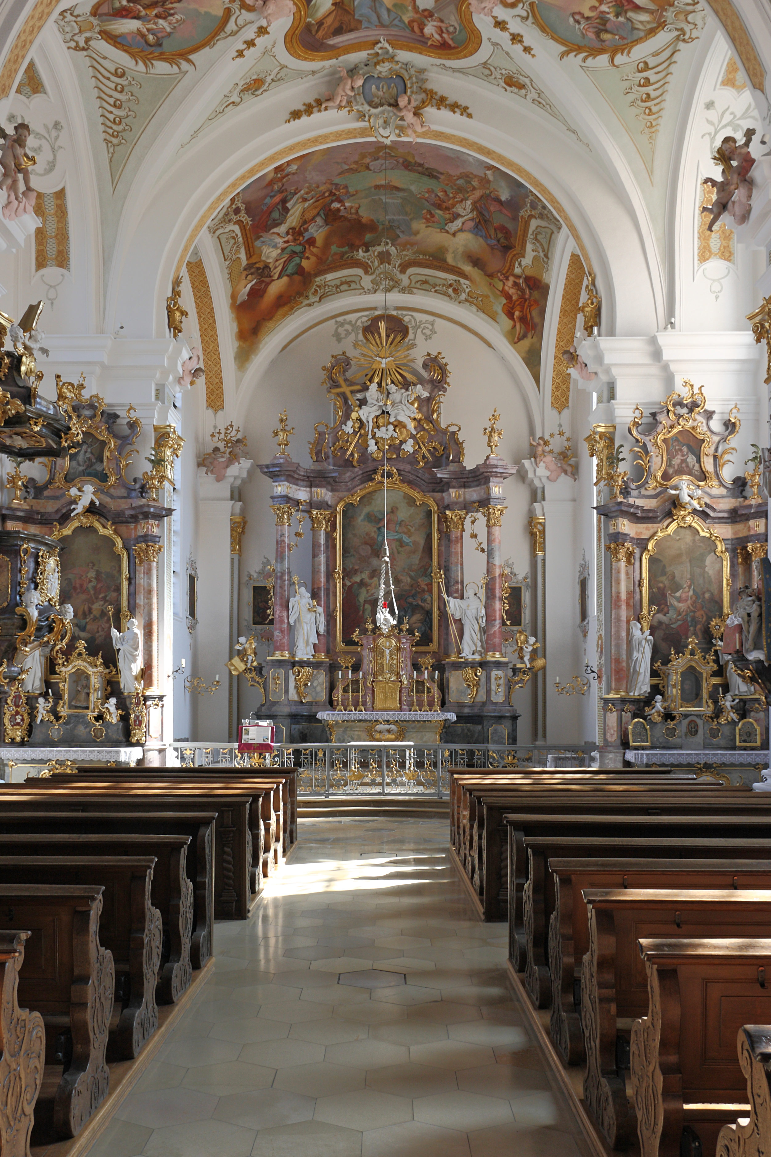 Kirche Mariä Himmelfahrt der Zisterzienserinnen-Abtei Oberschönenfeld in Gessertshausen im Landkreis Augsburg (Bayern)